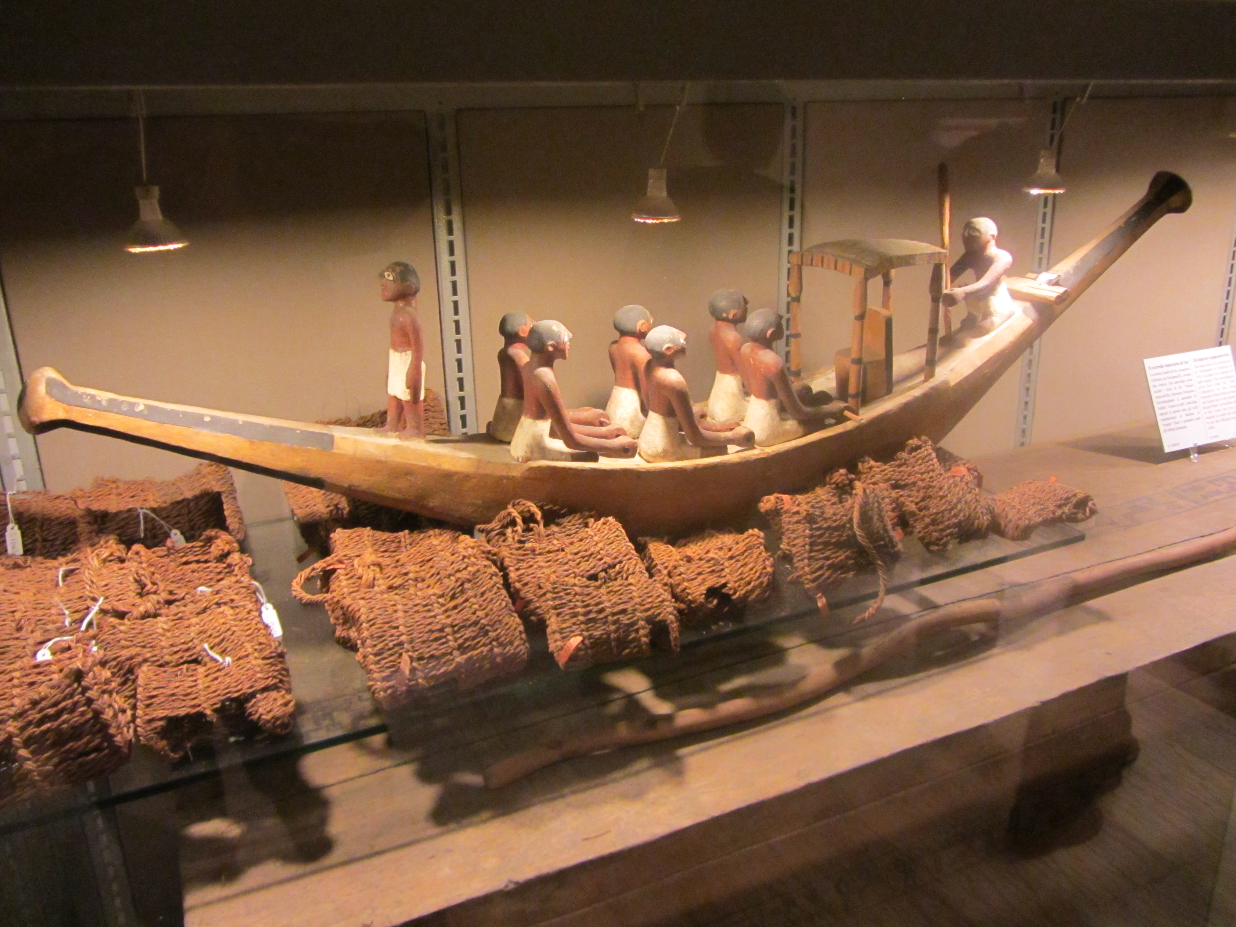 Modellino di barca, con schiavi, legno decorato (museo egizio di torino, parte 1 del museo)